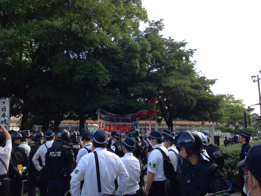 警察ともみ合う全学連活動家などの赤砦社派